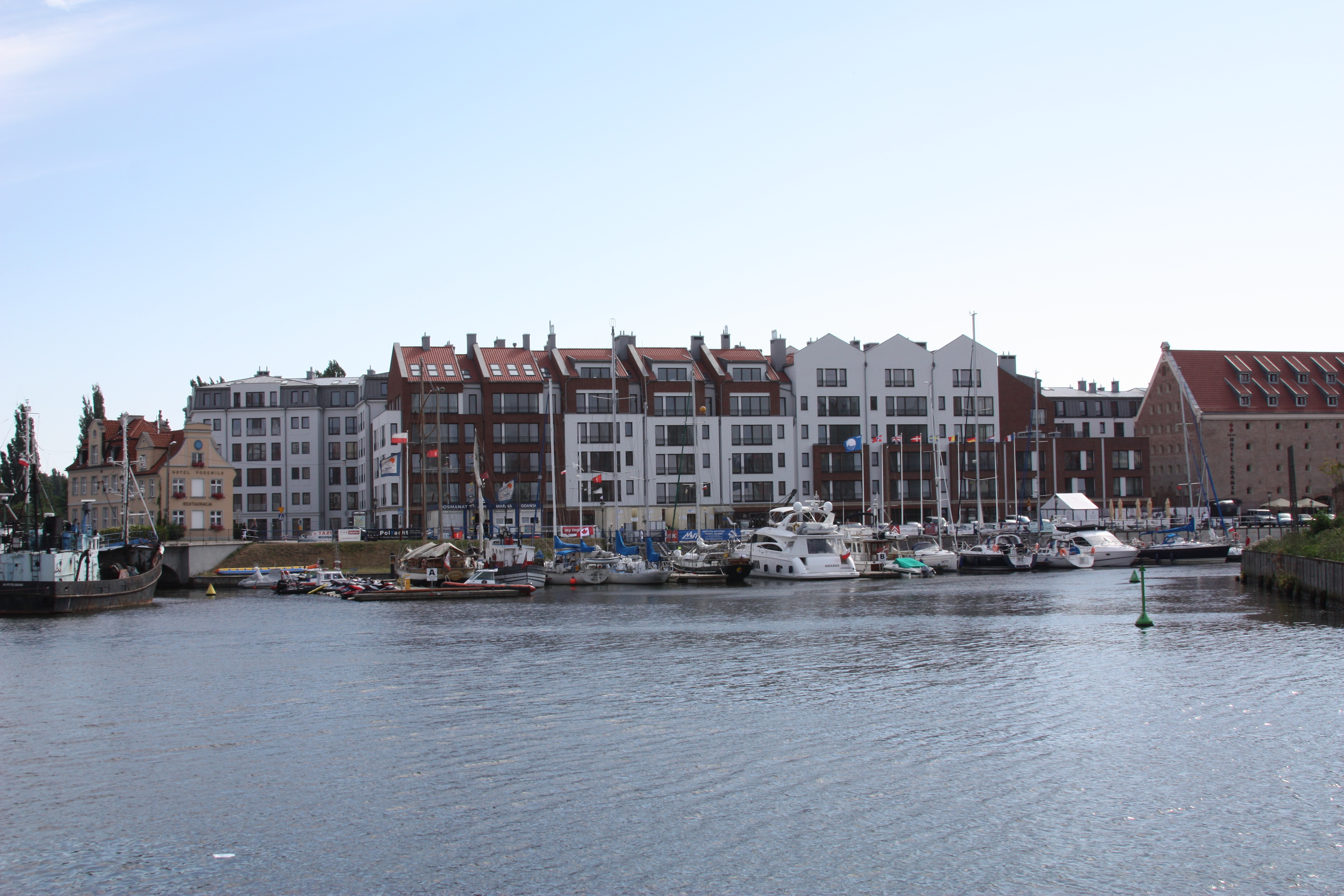 Gdańsk; Touristenfotos 2009